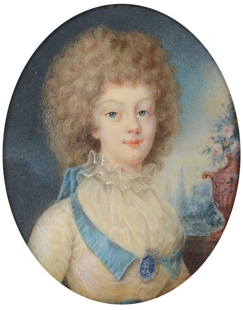 Графиня Наталия Петровна Головкина, ур. Измайлова (1768—1849)